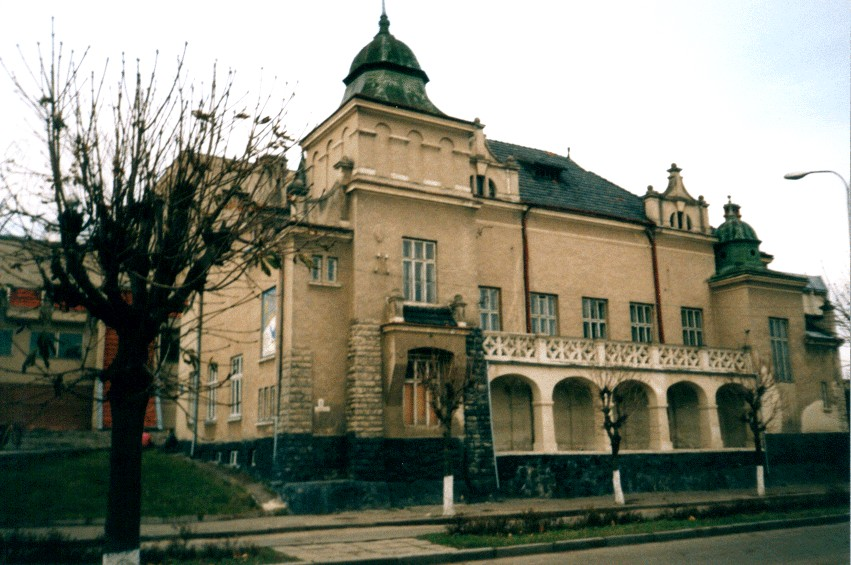 місто Перемишляни, Львівська область